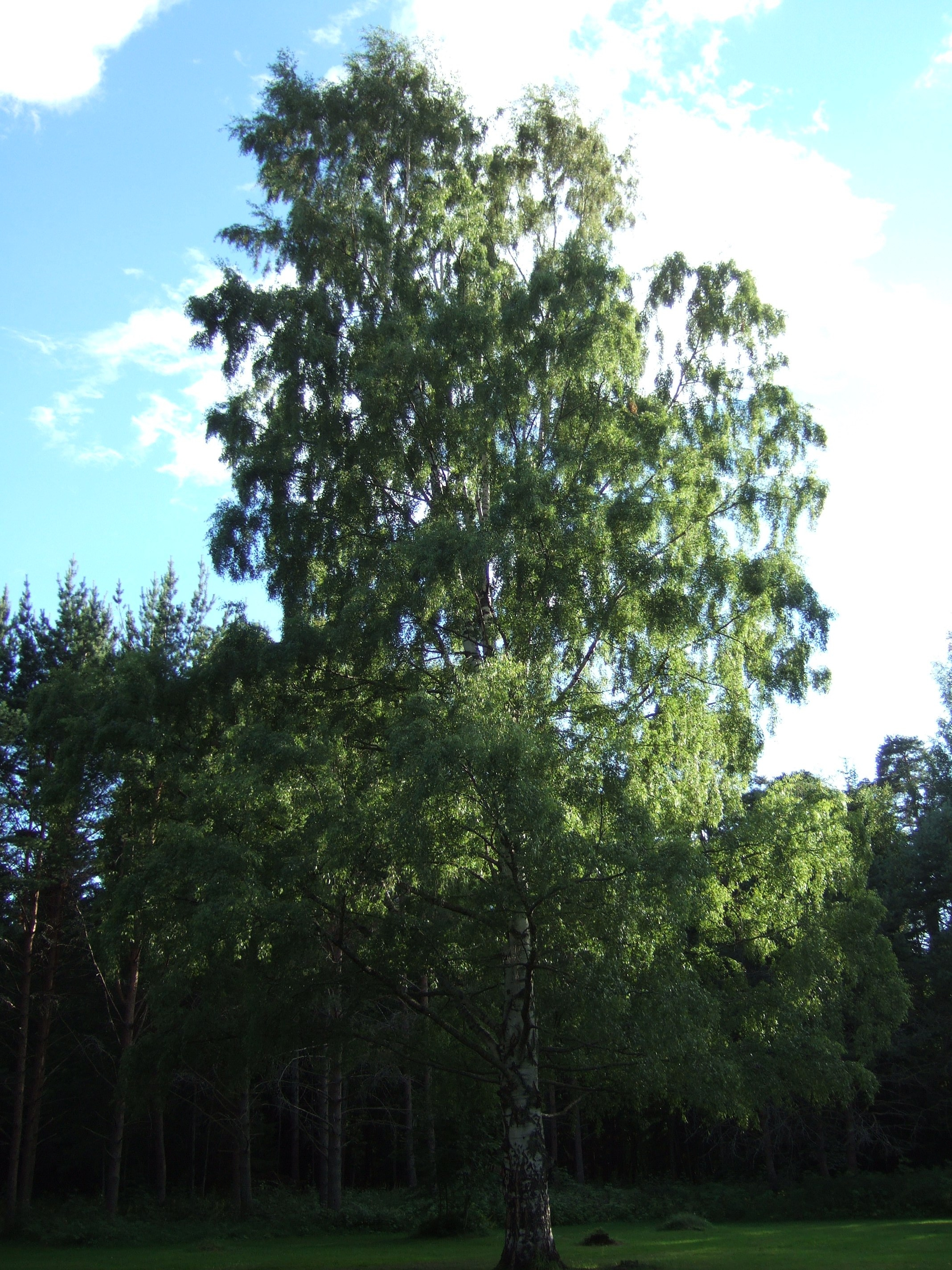 Ornäsbjörken (Betula pendula 'Dalecarlica') i Valls Hage, Gävle kommun